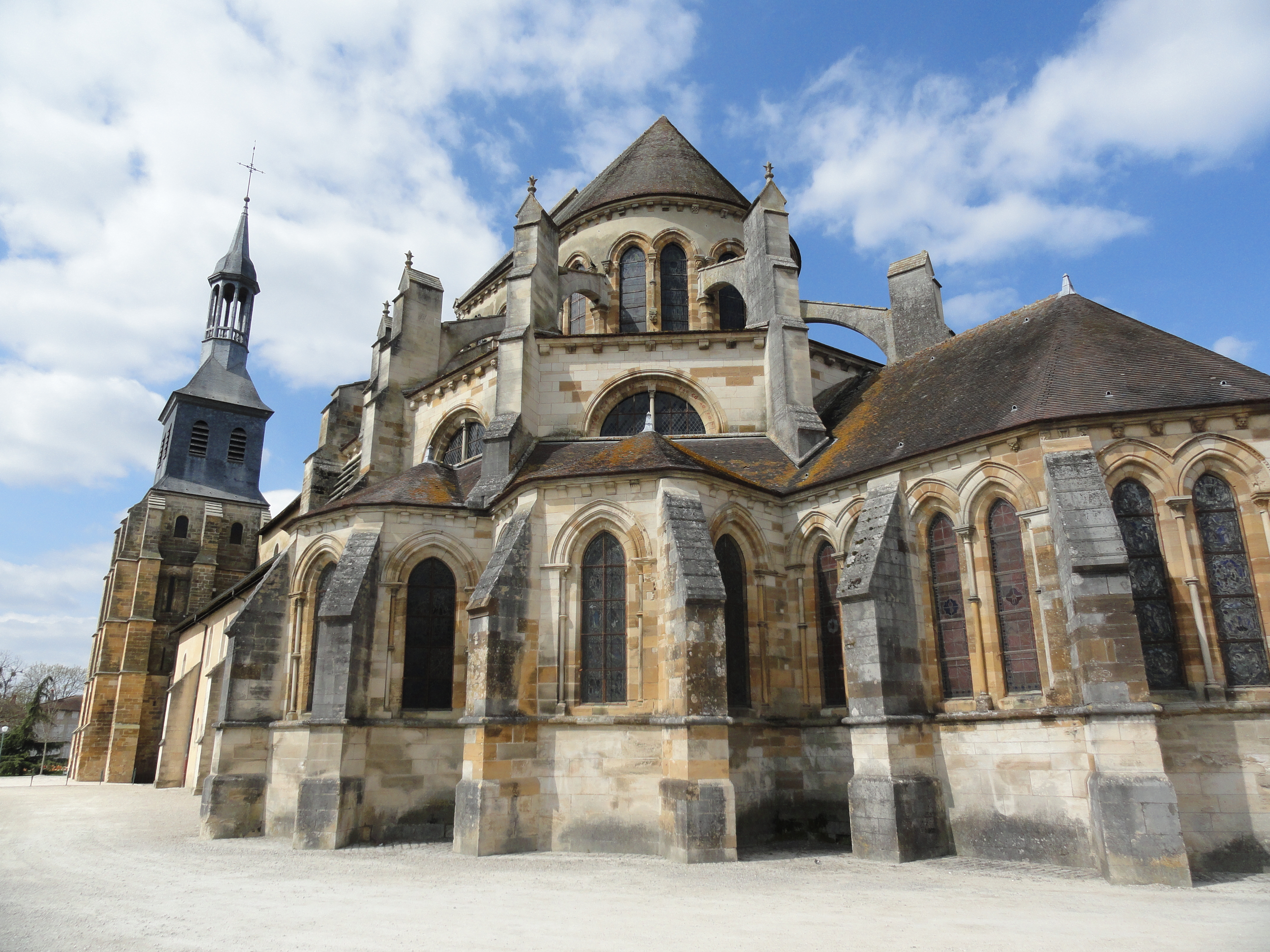 Chevet de l'Abbatiale Saint-Pierre-et-Saint-Paul de Montier-en-Der